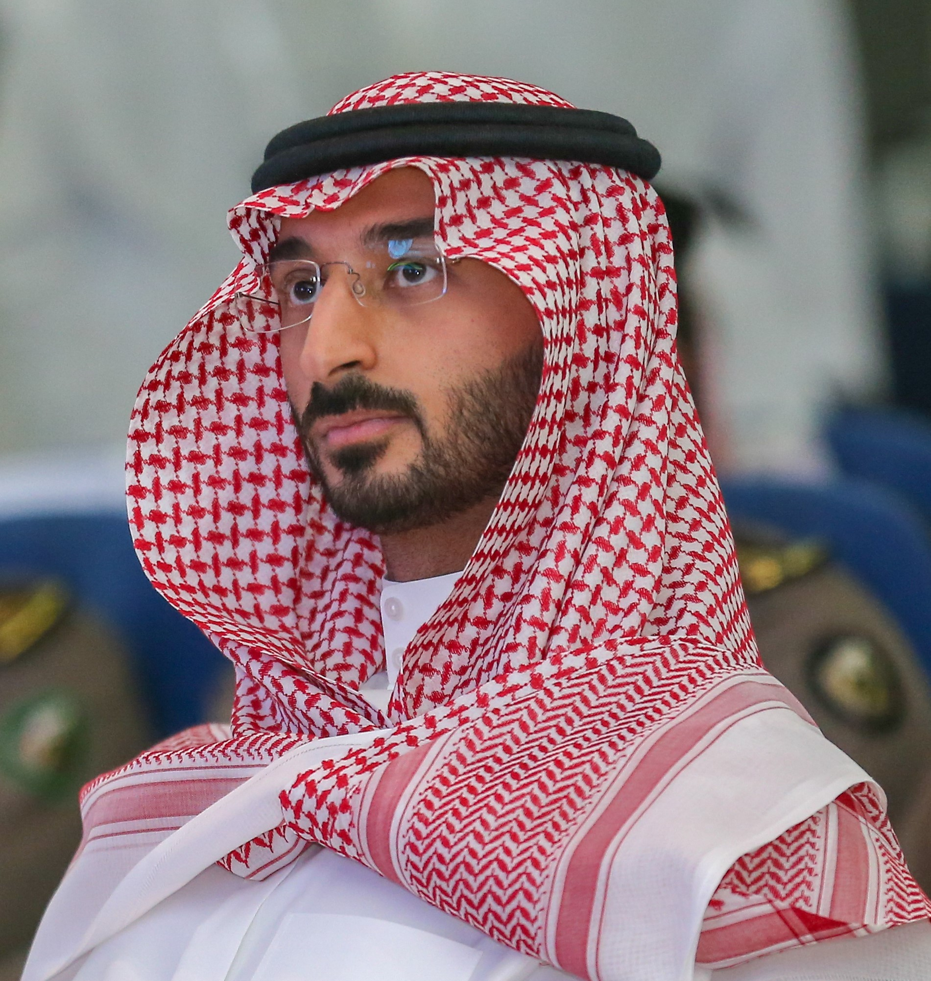 الأمير عبدالله بن بندر بن عبدالعزيز، وزير الحرس الوطني السعودي